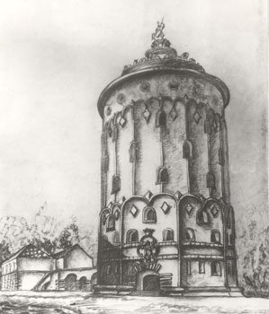 Эскиз здания